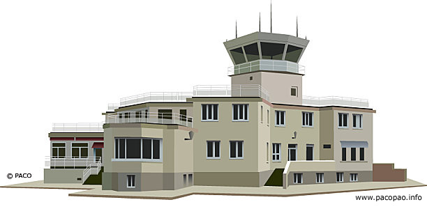 modelisation de l'Aéroport de Toussus-le-Noble